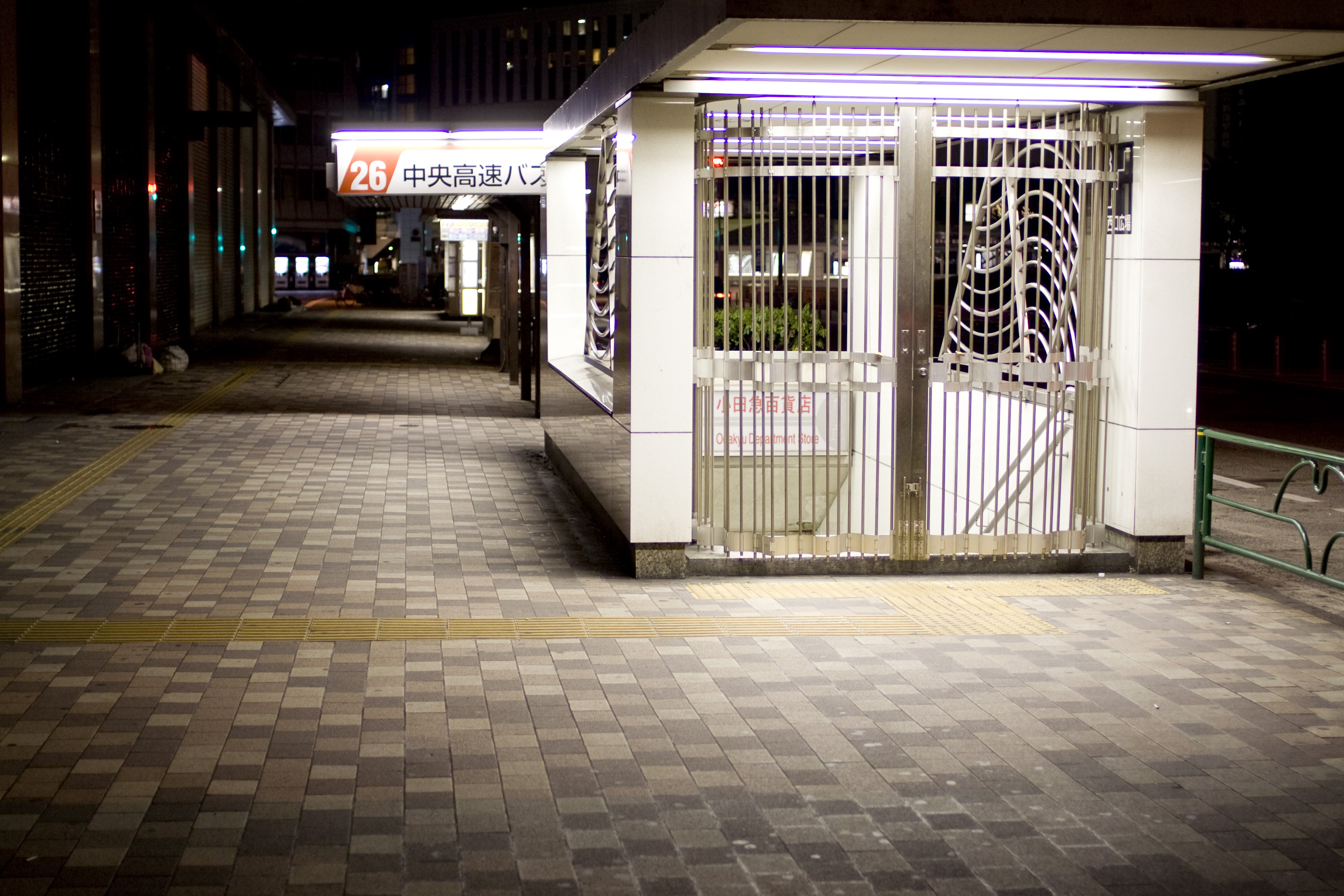 無題